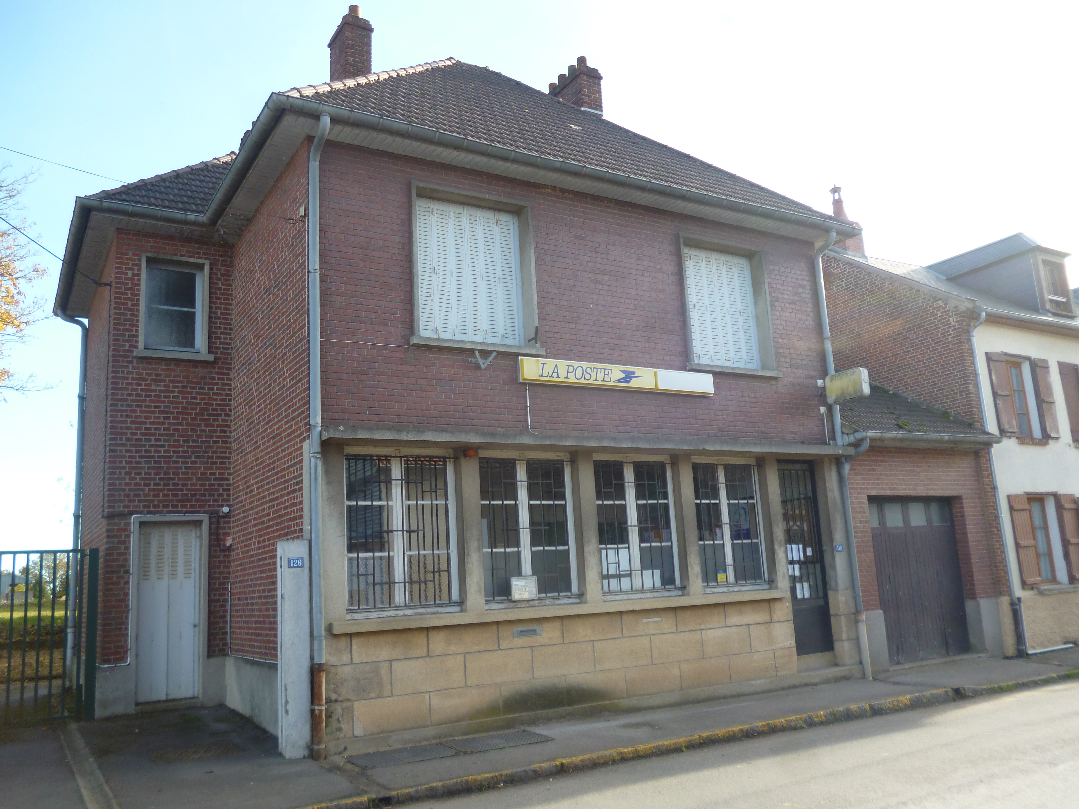 Agence postale de la commune de Noyers-Saint-Martin (Oise).